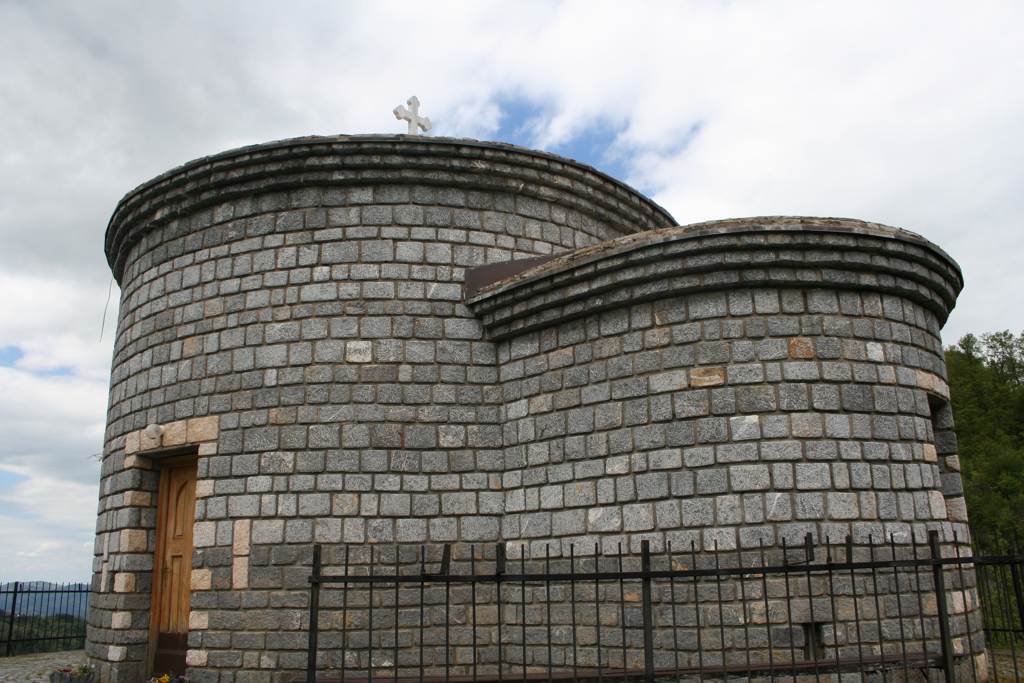 Manastir Bogoštica i Dom Desanke Maksimović